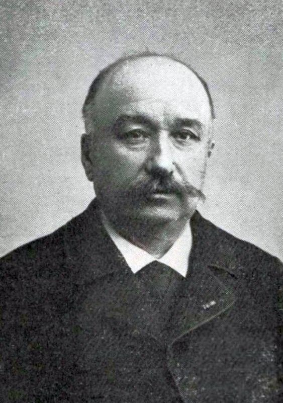 Clément Ader en 1910.